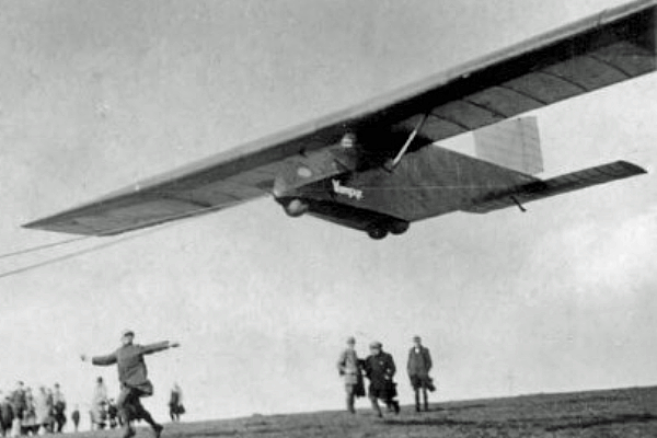 Ein Start der HAWA Vampyr 1922 in der Rhön